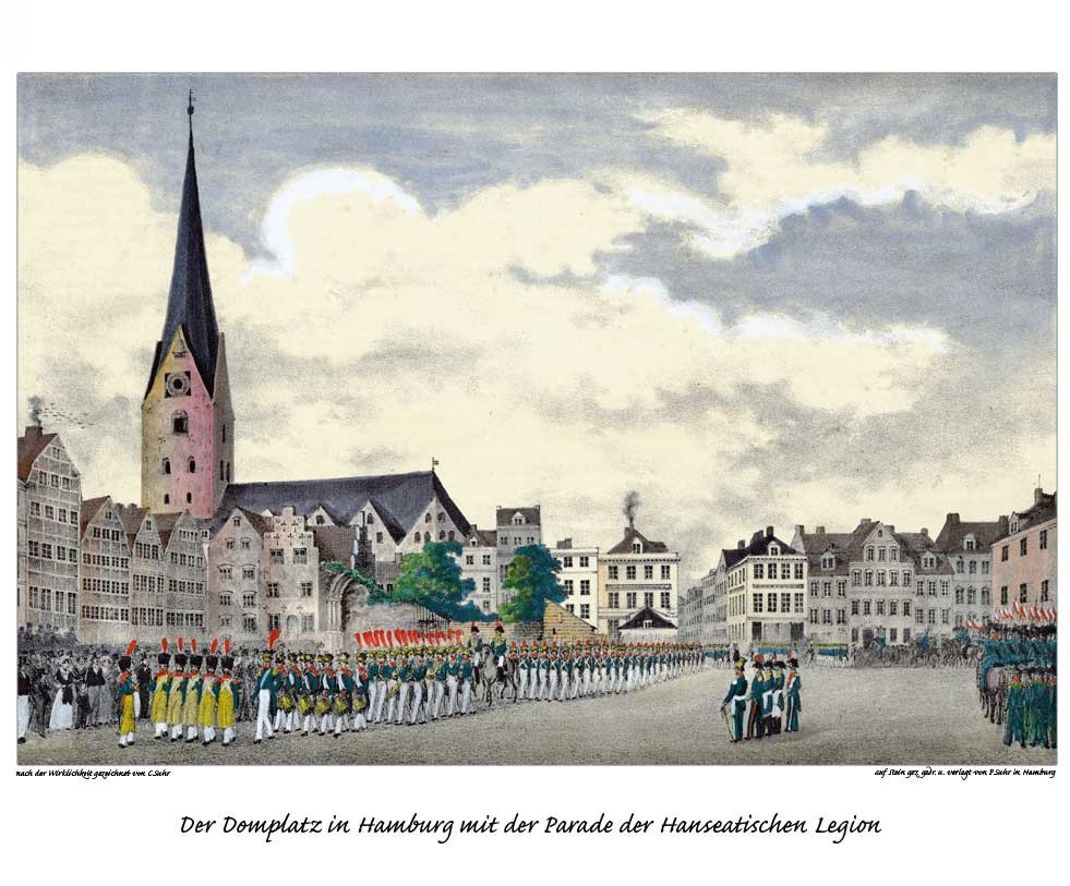 Parade der Hanseatischen Legion auf dem Domplatz in Hamburg